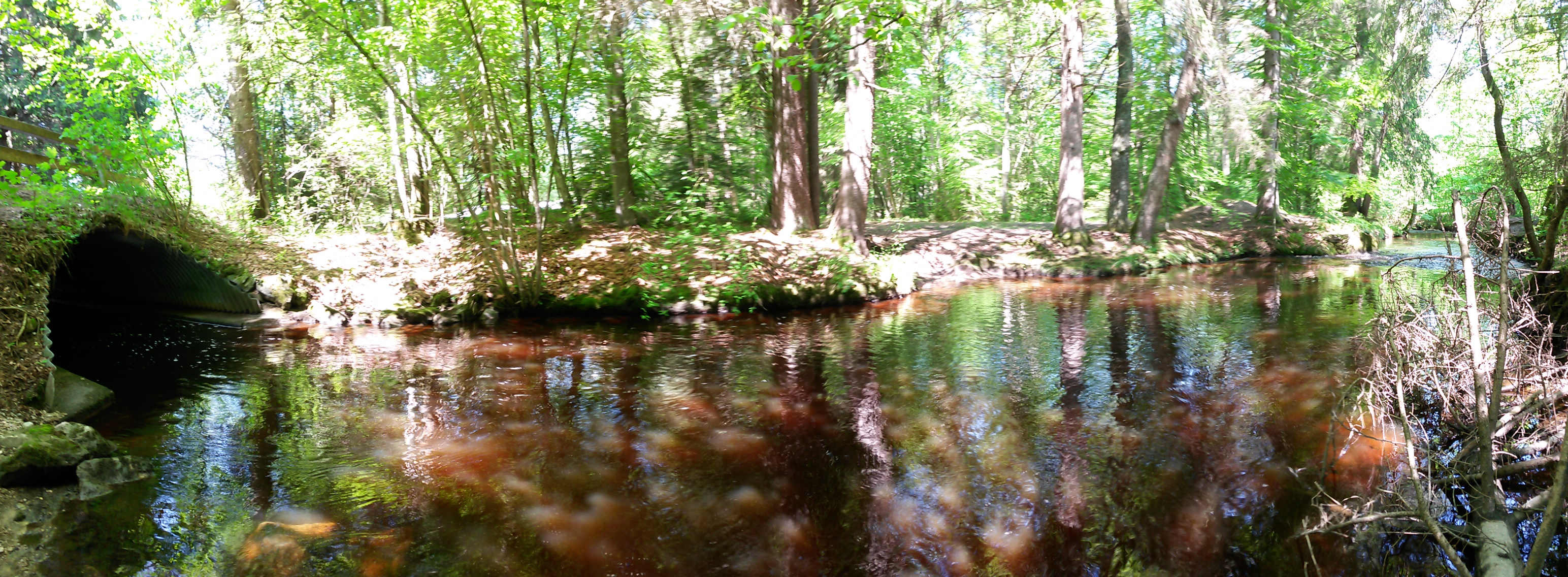 Ort: Rothmühle (Strasse) Nähe Jugendsiedlung Hochland e.V.